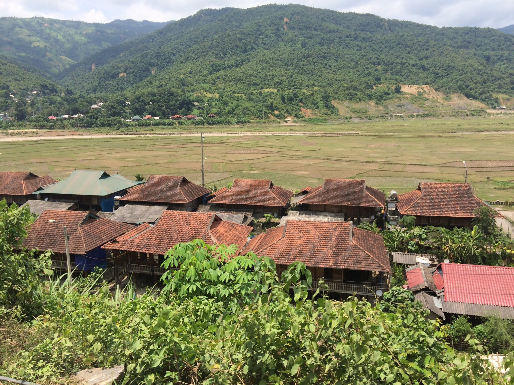 Lay Nưa, Thị Xã Mường Lay, Điện Biên, Vietnam